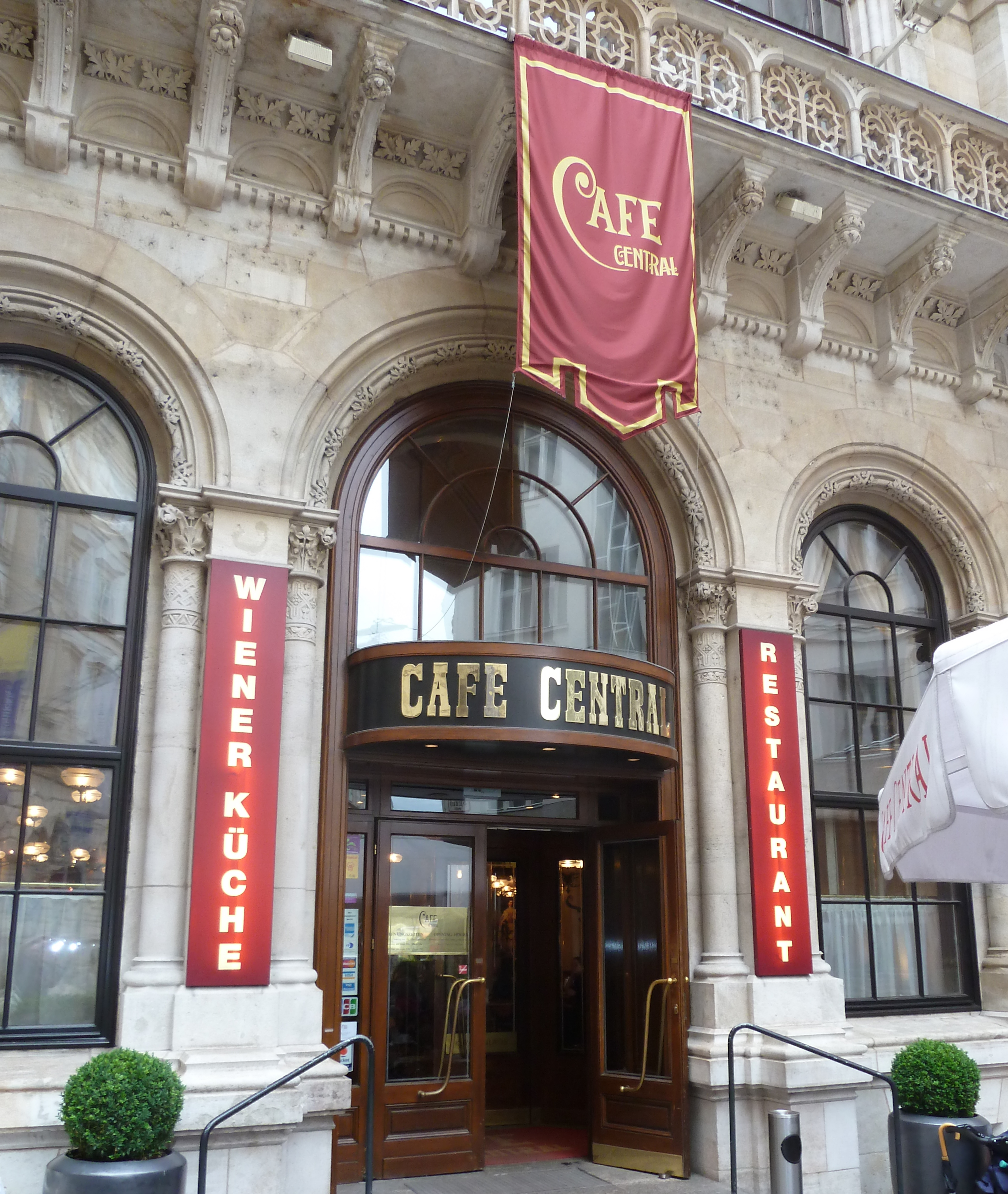 Cafe Central, Vienna, Austria